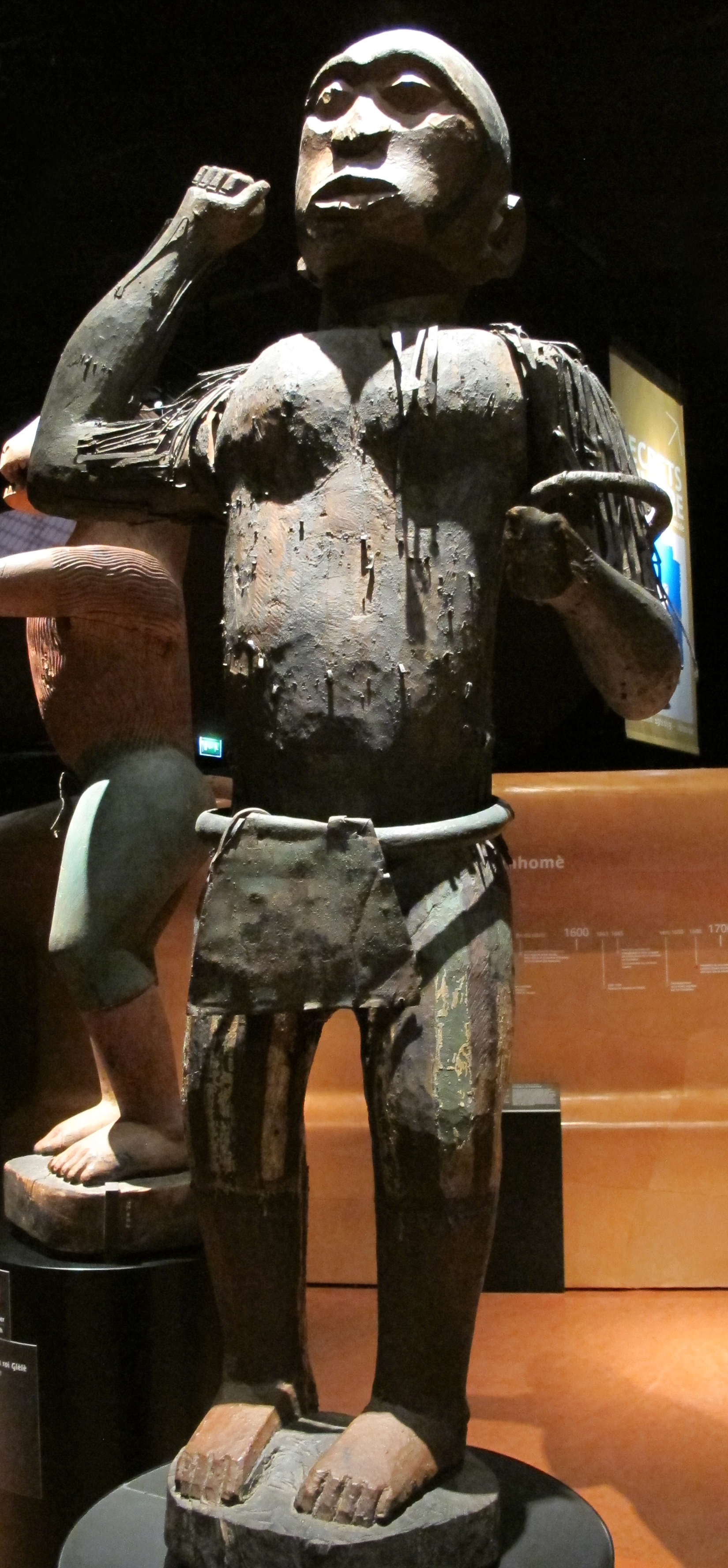 Museo di Quai Branly, Parigi